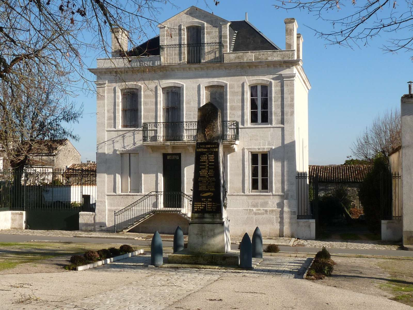 monument aux morts d'Hiersac, devant l'ancienne mairie, Charente, France